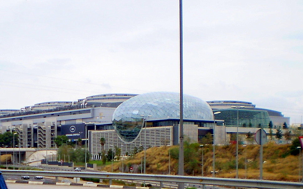 Esta es la Feria de Muestras de Valencia en Benimamet